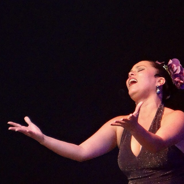 Foto da Andrea Marquee no musical Vingança.